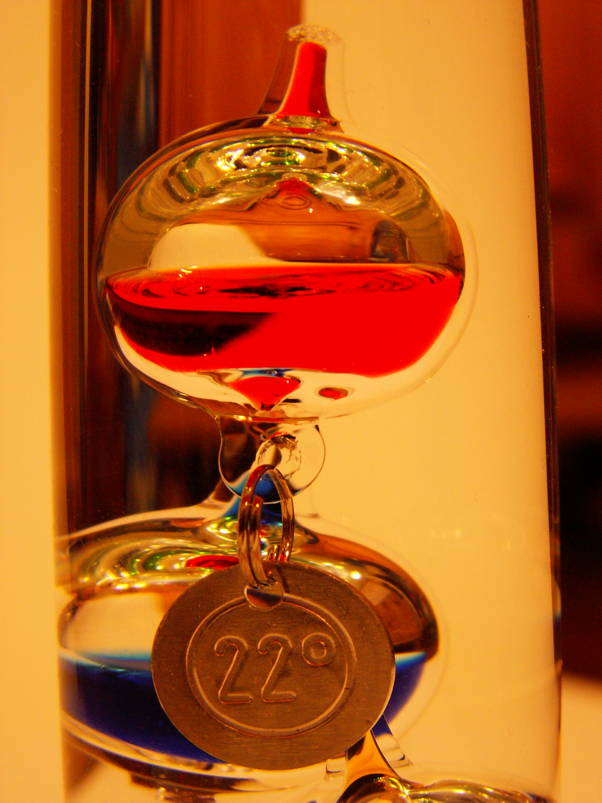 Supermakroaufnahme eines Glaskörpers eines Galileo Thermometers. Aufgenommen mit einer Konica Minolta Dimage Z5